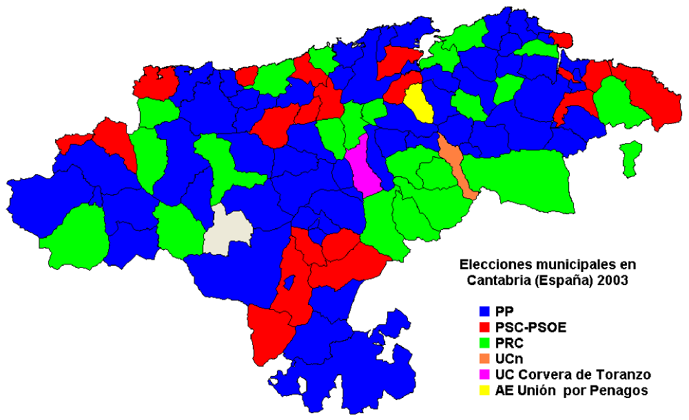 Mapa de los resultados de las elecciones municipales de 2003 en Cantabria (España) Map of the results of the municipal elections of 2003 in Cantabria (Spain) Autor:xuankar